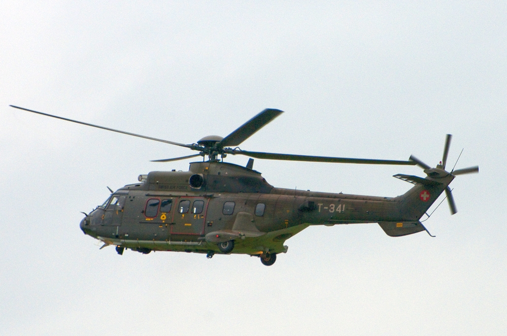 20100724-_DSC8490